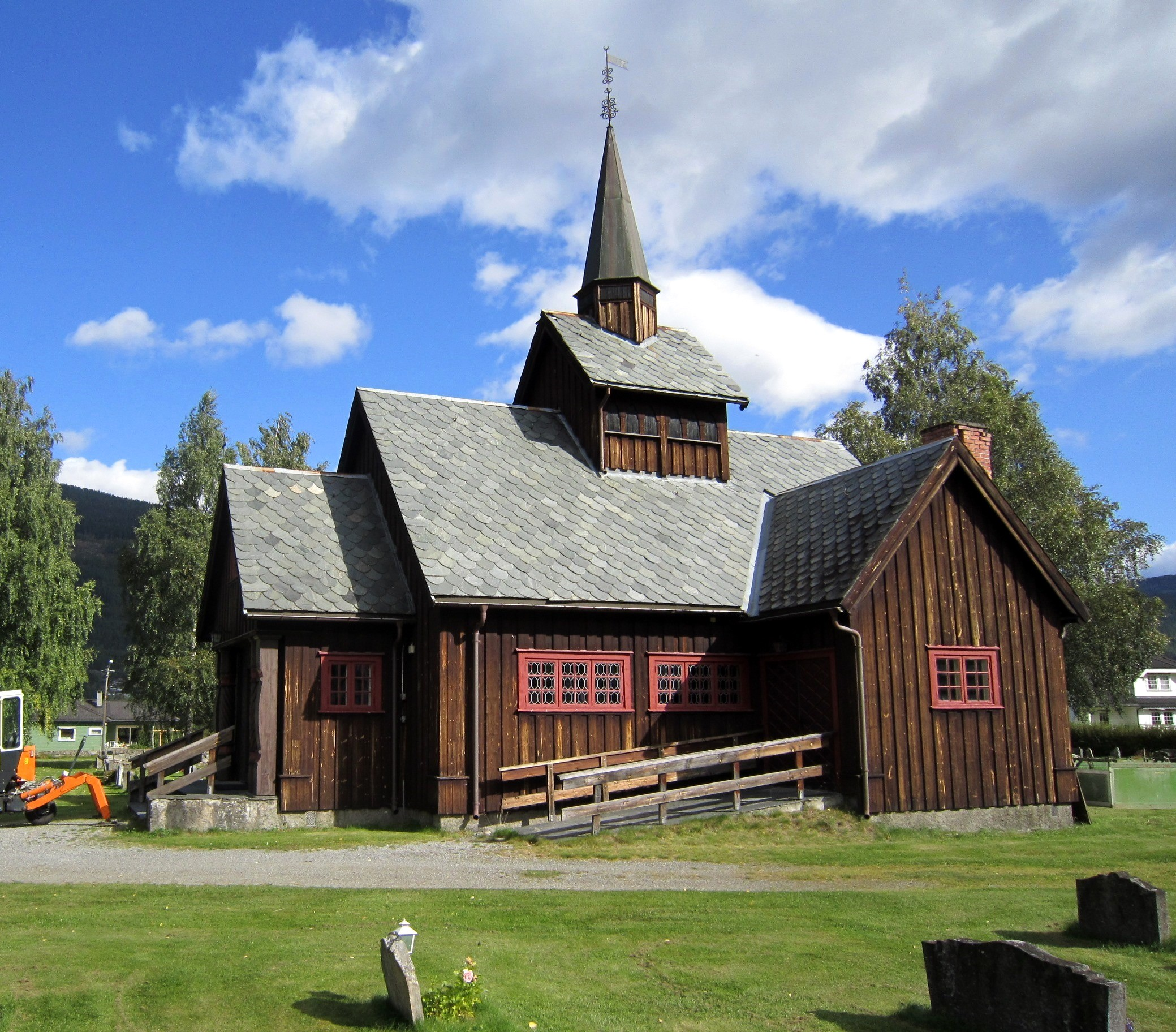 Nes kapell, gravkapellet på kirkegården i Nesbyen